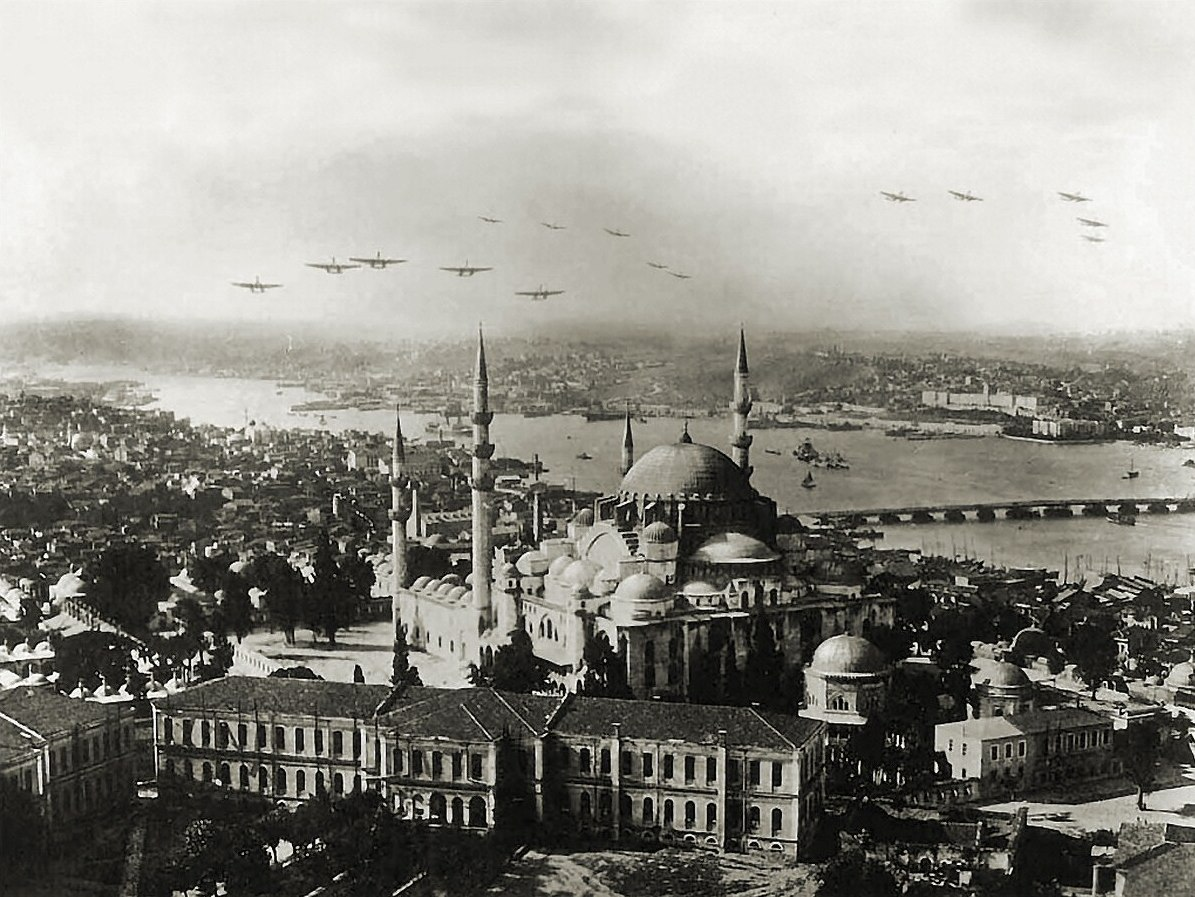 Savoia Marchetti S.55 repülők Isztambul felett. Előtérben a Hagia Sophia.